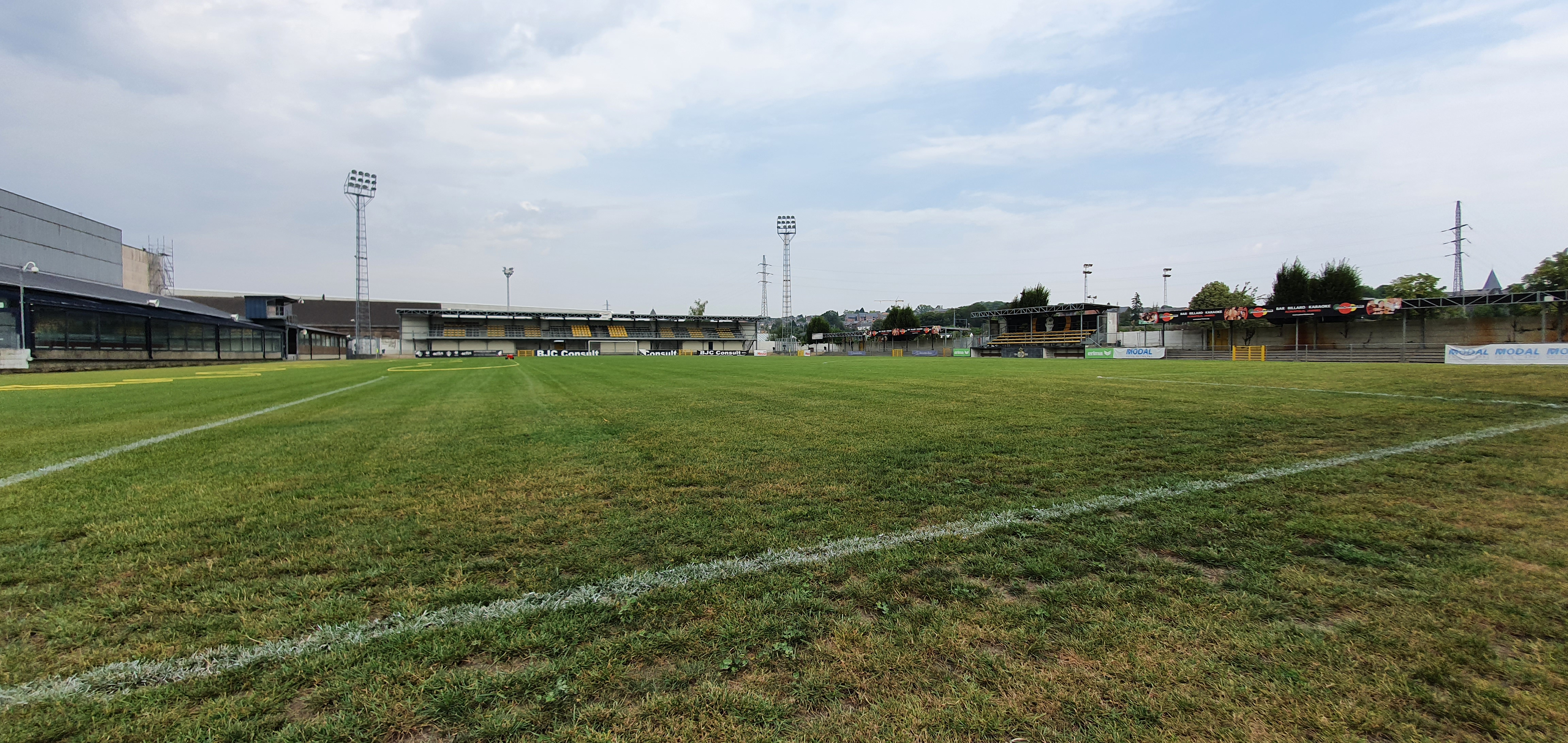 stade football Namur